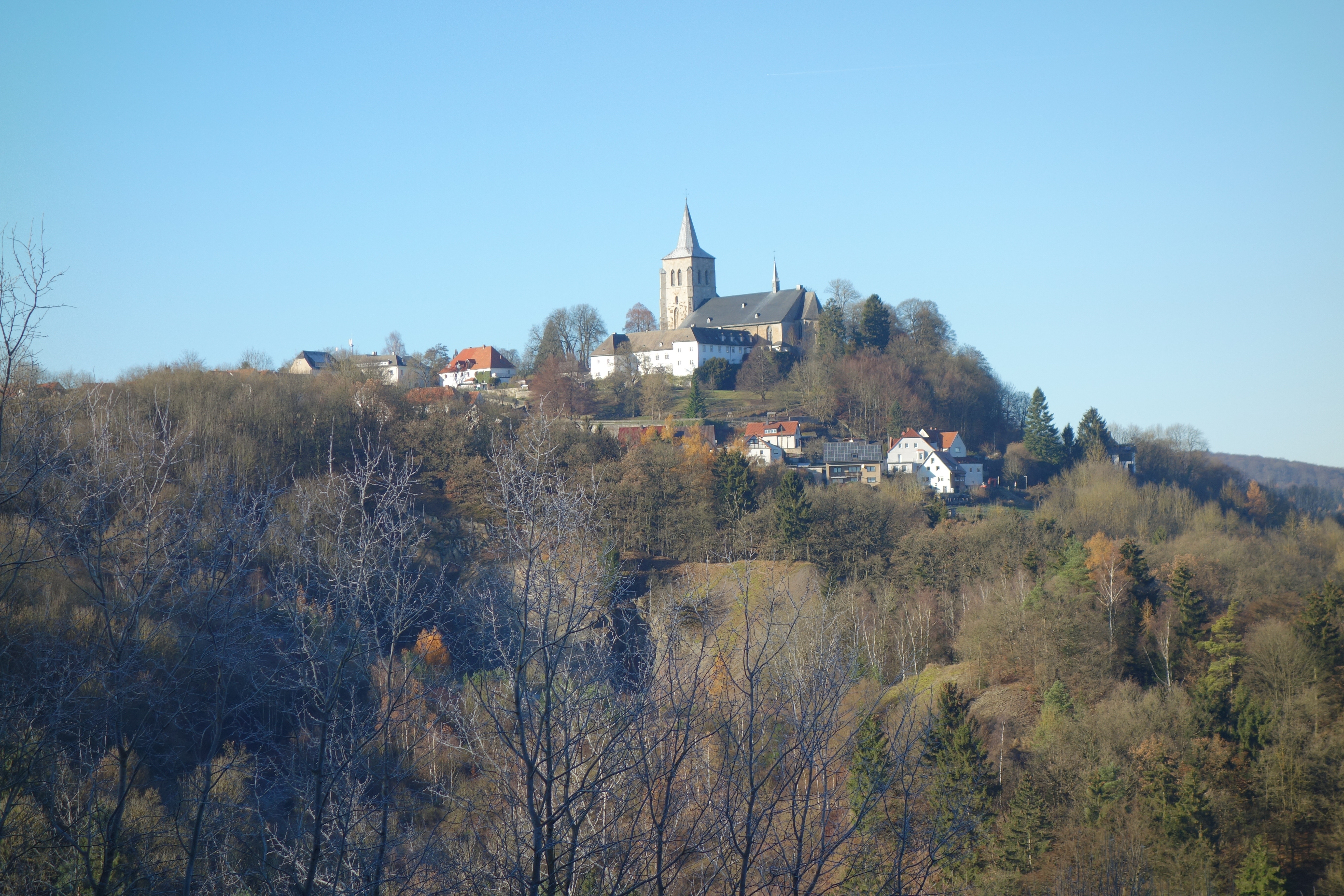 Stiftskirche St. Peter und Paul in Obermarsberg von Südosten aus dem Naturschutzgebiet Wulsenberg aufgenommen.